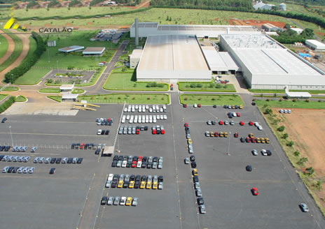 Foto do pátio da Montadora Mitsubishi, localizada no Distrito Mineroindustrial de Catalão (DIMIC), em Goiás.